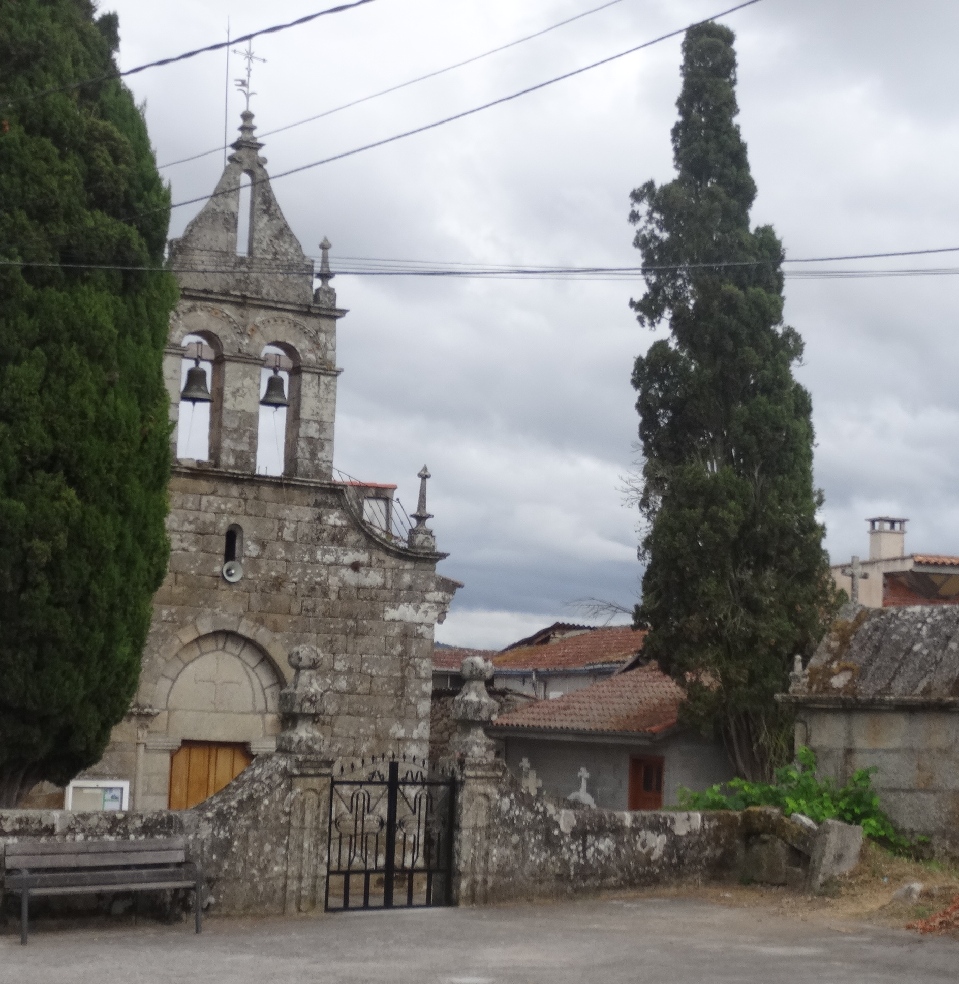 Ver título.